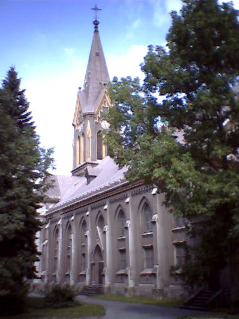 Evangelický kostel v Třinci, okres Frýdek-Místek Lutheran Church in Třinec, Frýdek-Místek District, Czech republic